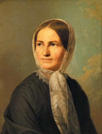 Porträt Frau Professor Wilhelmine Suhrlandt. Unbezeichnet